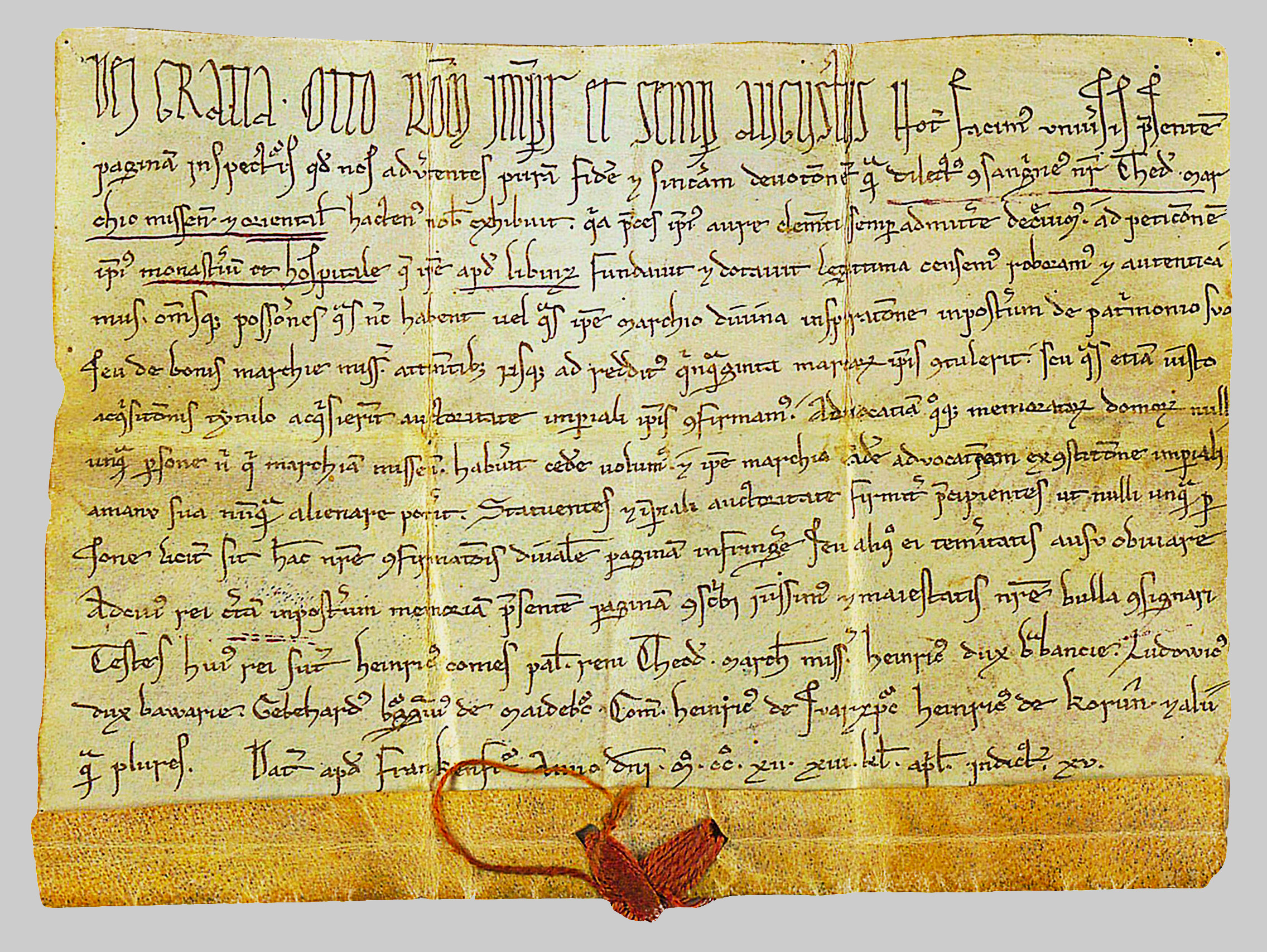 Gründungs-Urkunde St. Georg Leipzig. Bild aus Wikipedia, von H.-P.Haack bearbeitet 23. März 2012